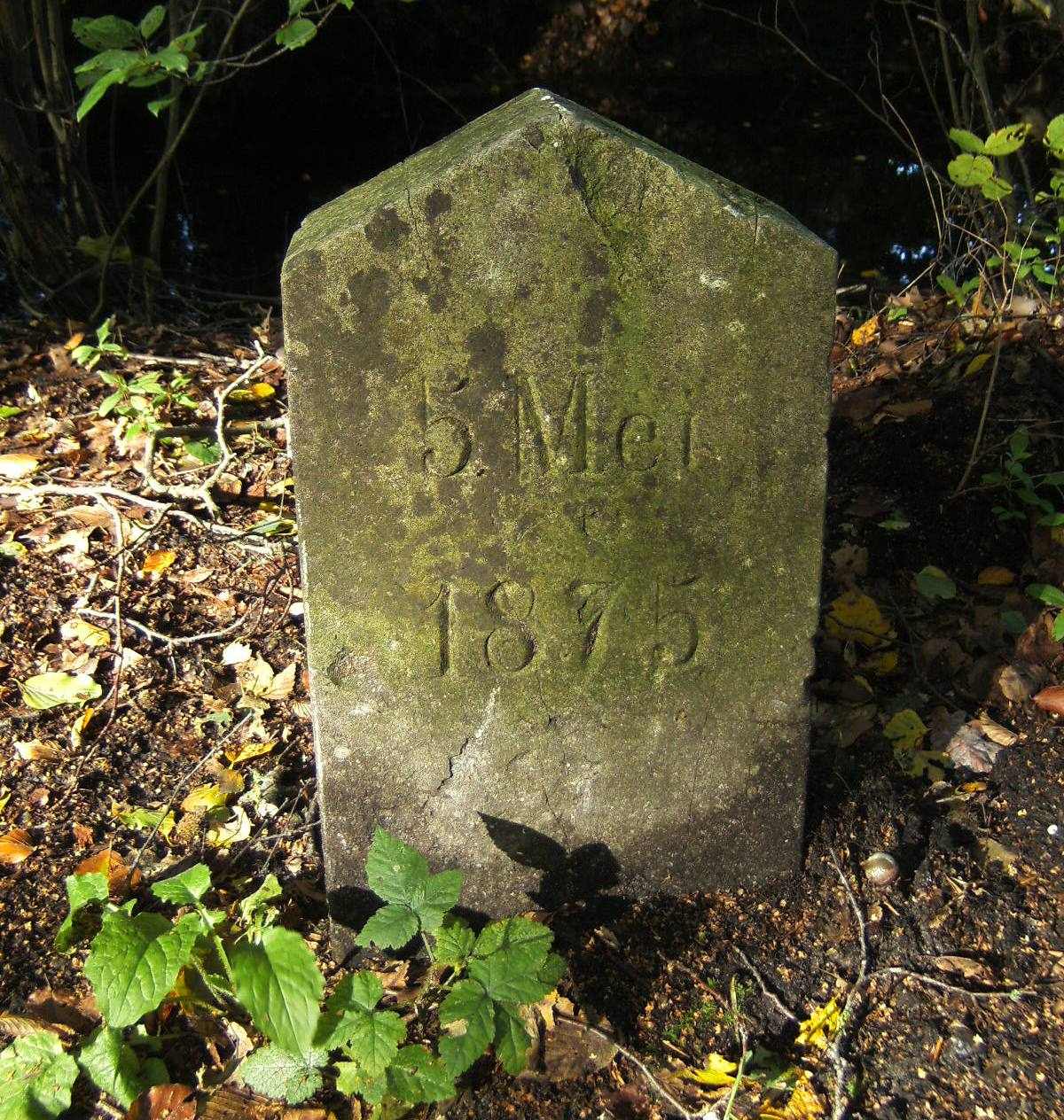 Natuurstenen monumentje in de berm van de Molenweg te Olst waar op 5 mei 1875 jonkheer E. Teding van Berkhout van zijn paard viel en aan de gevolgen daarvan overleed.